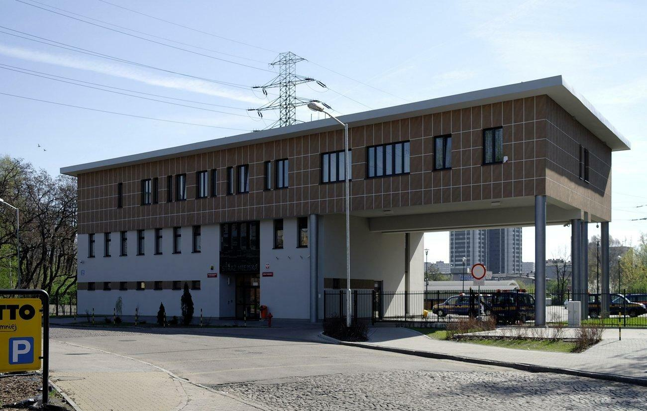 Straż Miejska Katowice